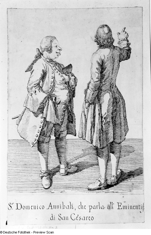 Karikatur des Kastraten Domenico Annibali Senior Domenico Annibali che parla al Eminentissimo di San Cesareo Herr Domenico Annibali, wie er sich mit dem Chef des Teatro di San Cesareo (Theater in Rom in der Barockzeit und bis heute) unterhält Verwalter : Staatliche Kunstsammlungen Dresden (SKD), Inv.-Nr.: Ca 51, Nr. 27 Aufnahme-Nr.: df_hauptkatalog_0267027 Datensatz-Nr.: obj 70255341